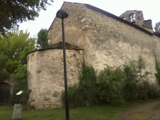 Absis d'estil llombard